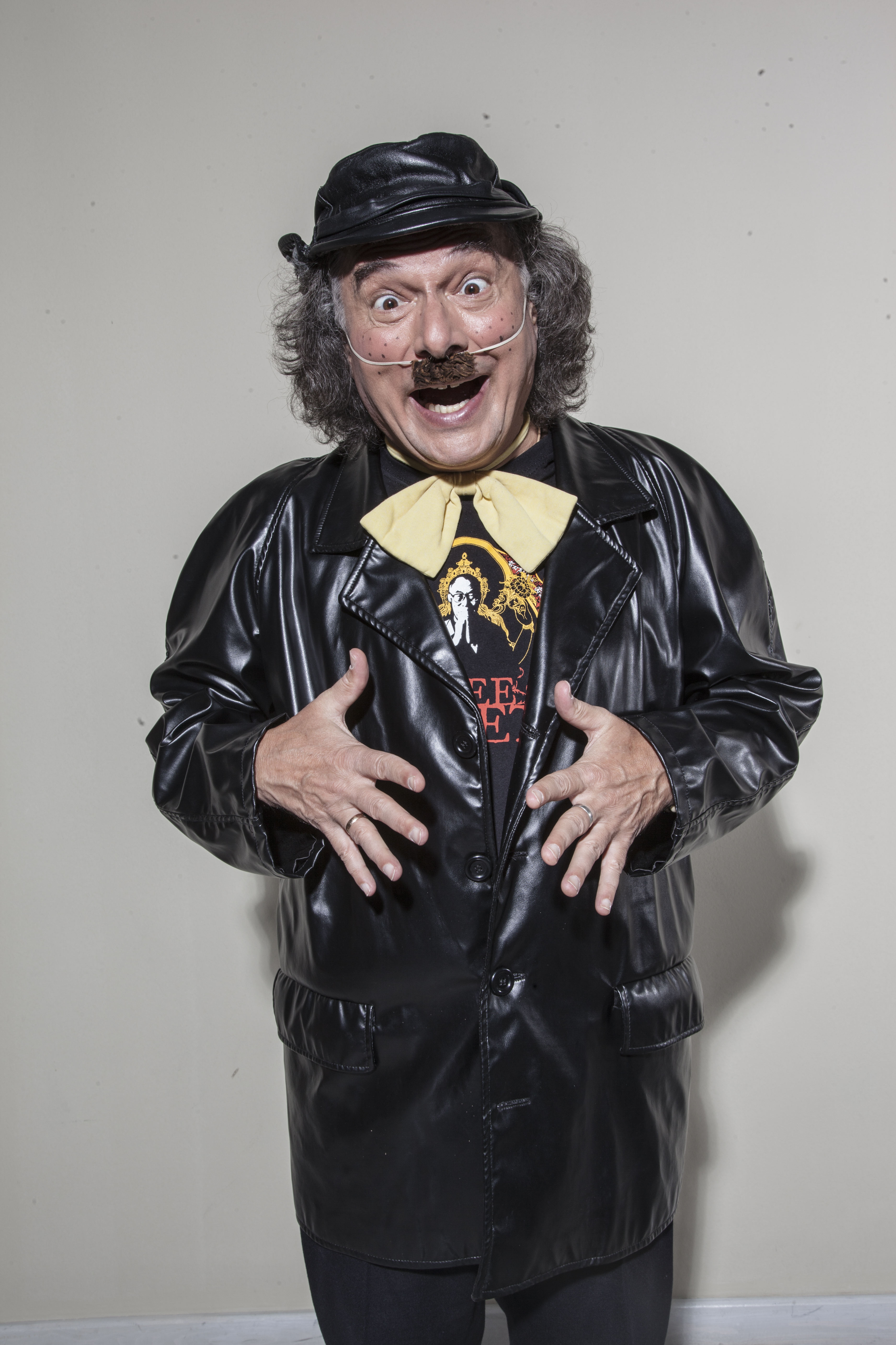 Laár András mint Besenyő Pista bácsi